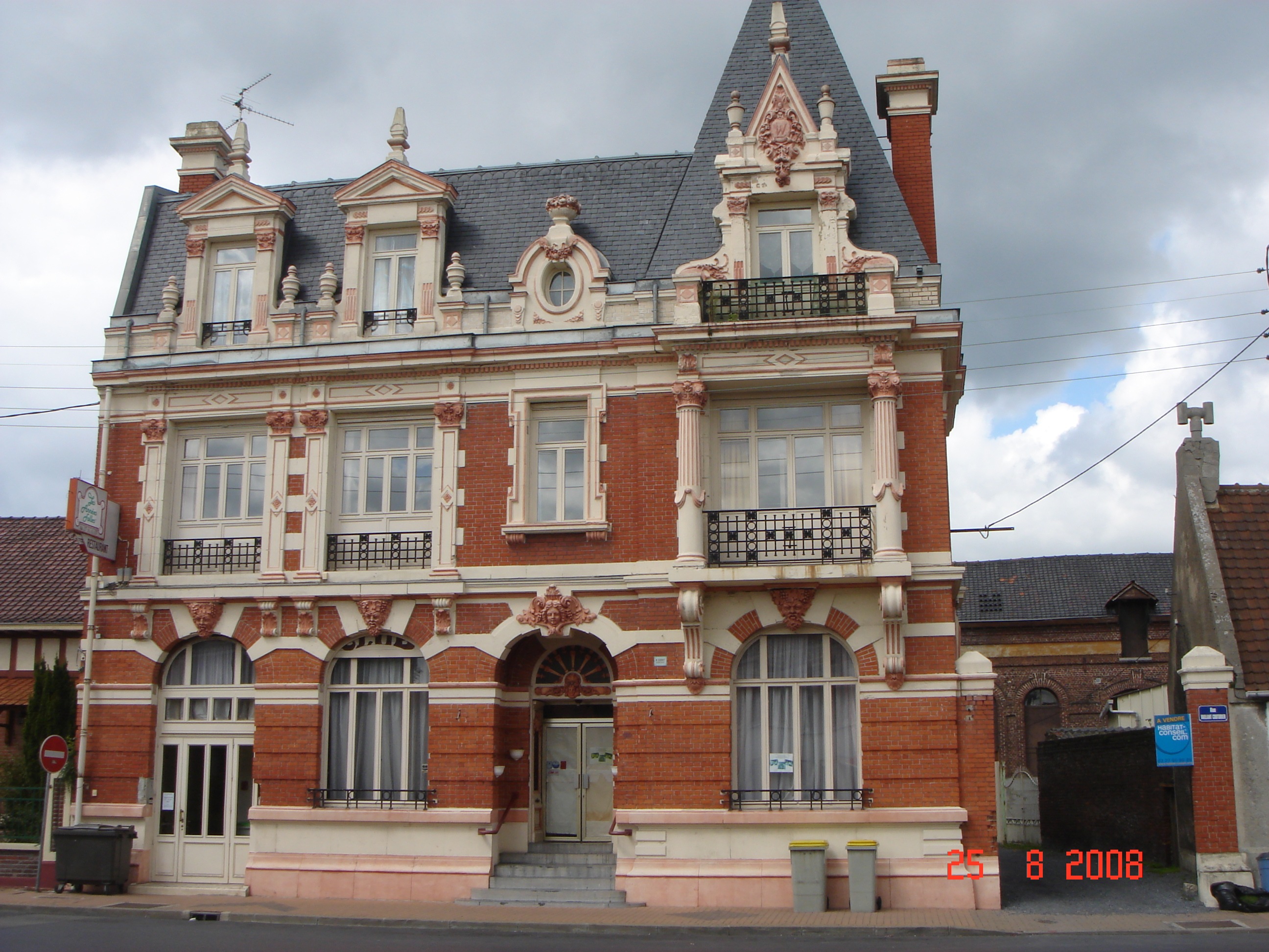 Brasserie Laden wallez à somain (59) france architecte henri Sirot 1906